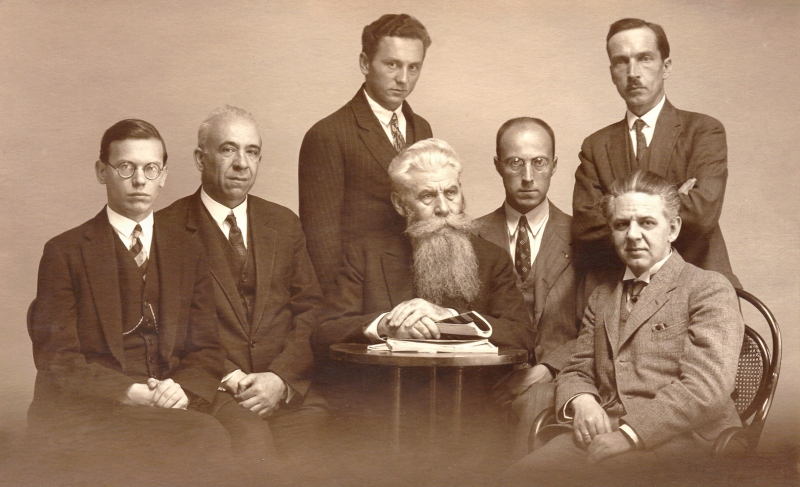 Gruppenfoto der Mitglieder mit rückseitigen Unterschriften. V.l.n.r.: Engelbert Pigal, Karl Janotta, A. Deminger, Hanns Hörbiger, Eugen Moess, Franz Houdek, Johann Robert Hörbiger